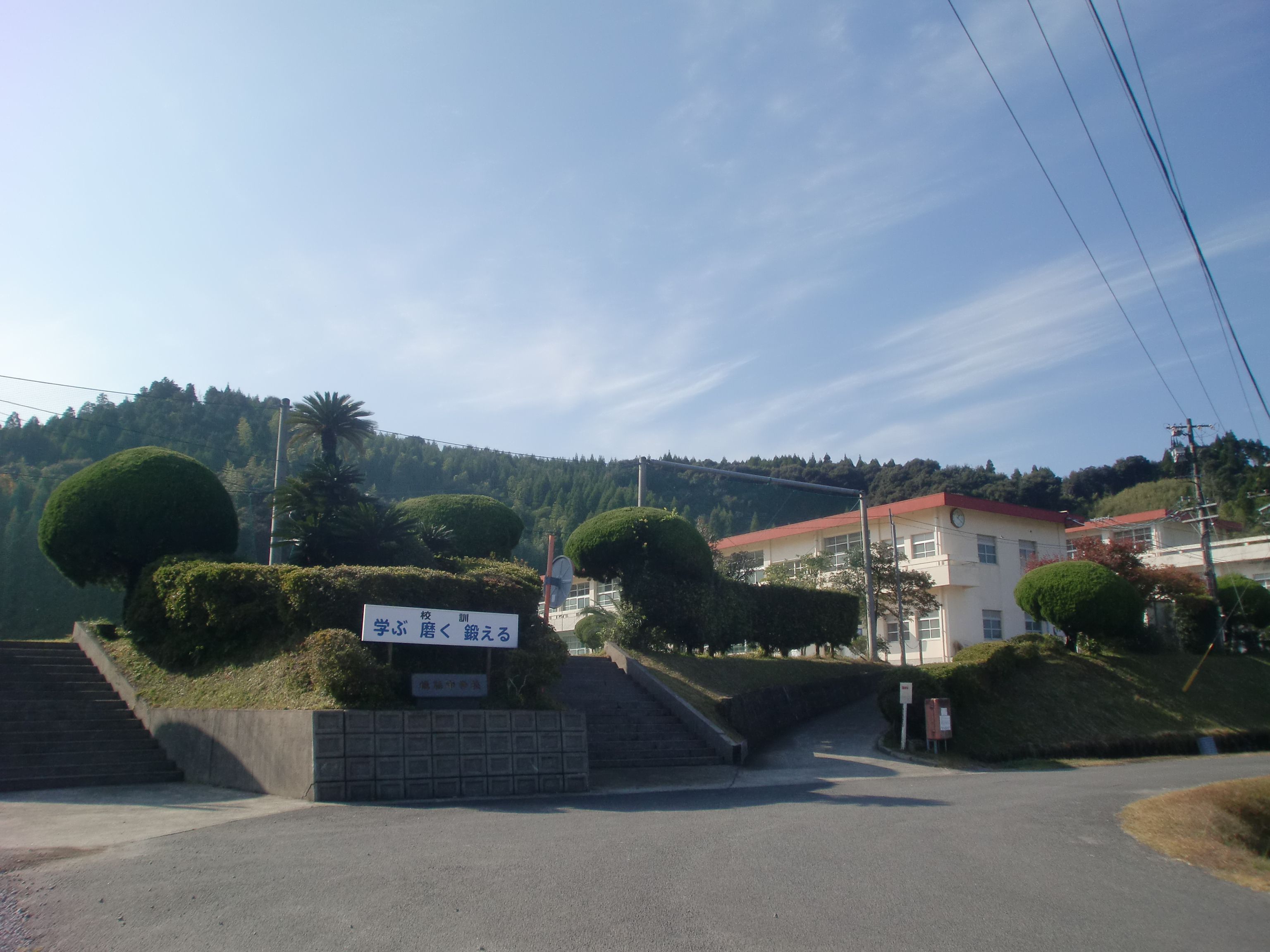 薩摩川内市立樋脇中学校の外観。